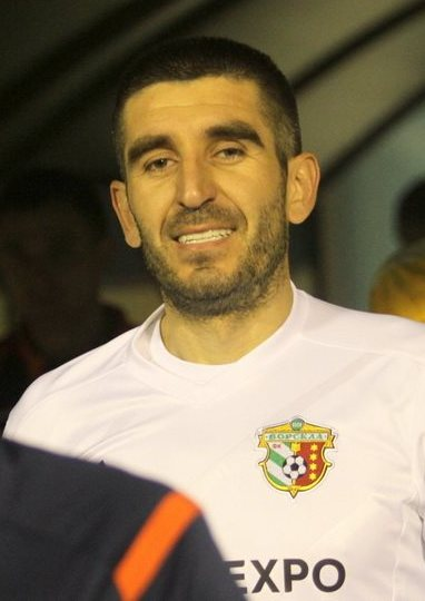 Арменд Даллку - албанський футболіст у складі Ворскли